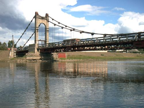 Briansker Brücke in Ust-Kataw, Foto von Roland Bathon (zur freien Verwendung freigegeben)